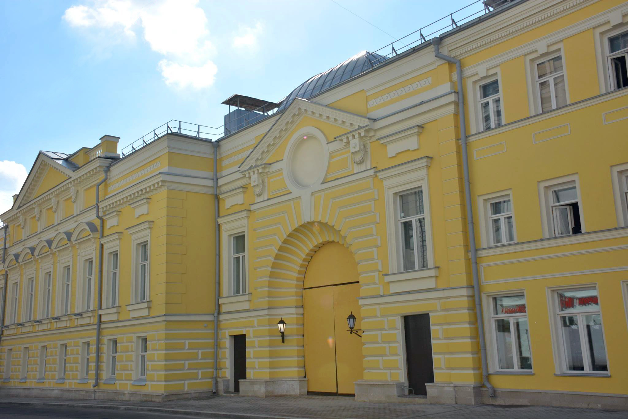 Здание театра «Геликон-опера» на Большой Никитской